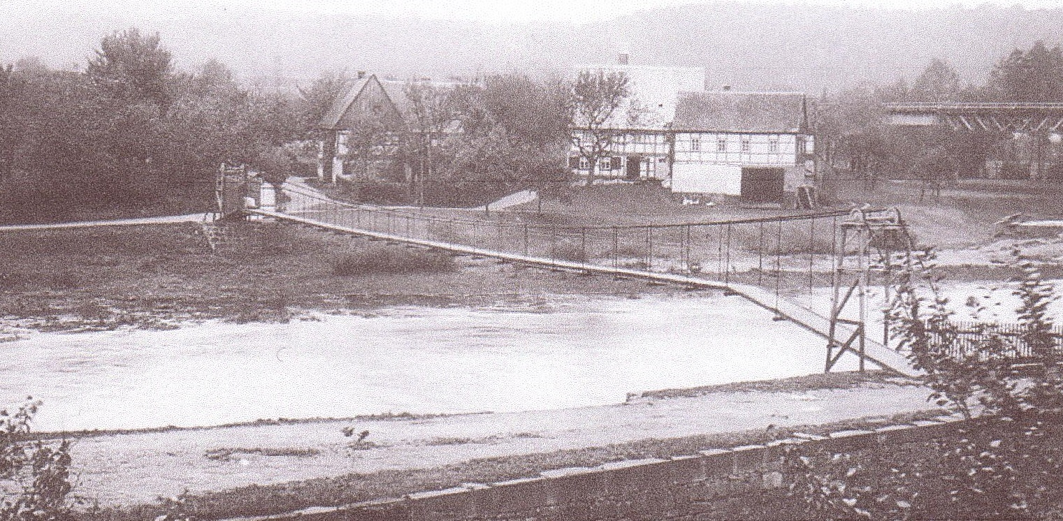 Fotografie der Hängebrücke über die Rochlitzer Mulde